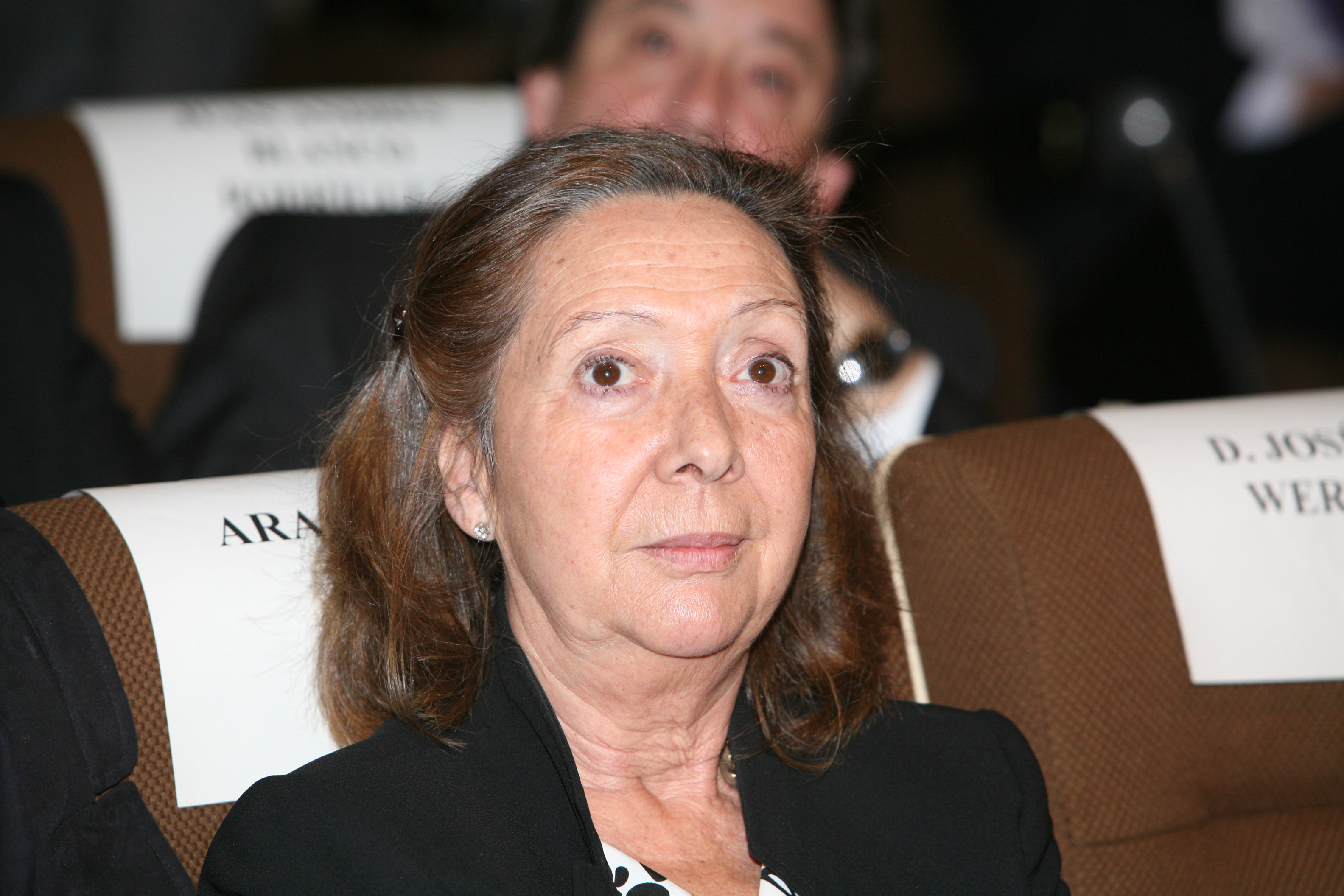 Araceli Maciá Antón, rectora de la UNED